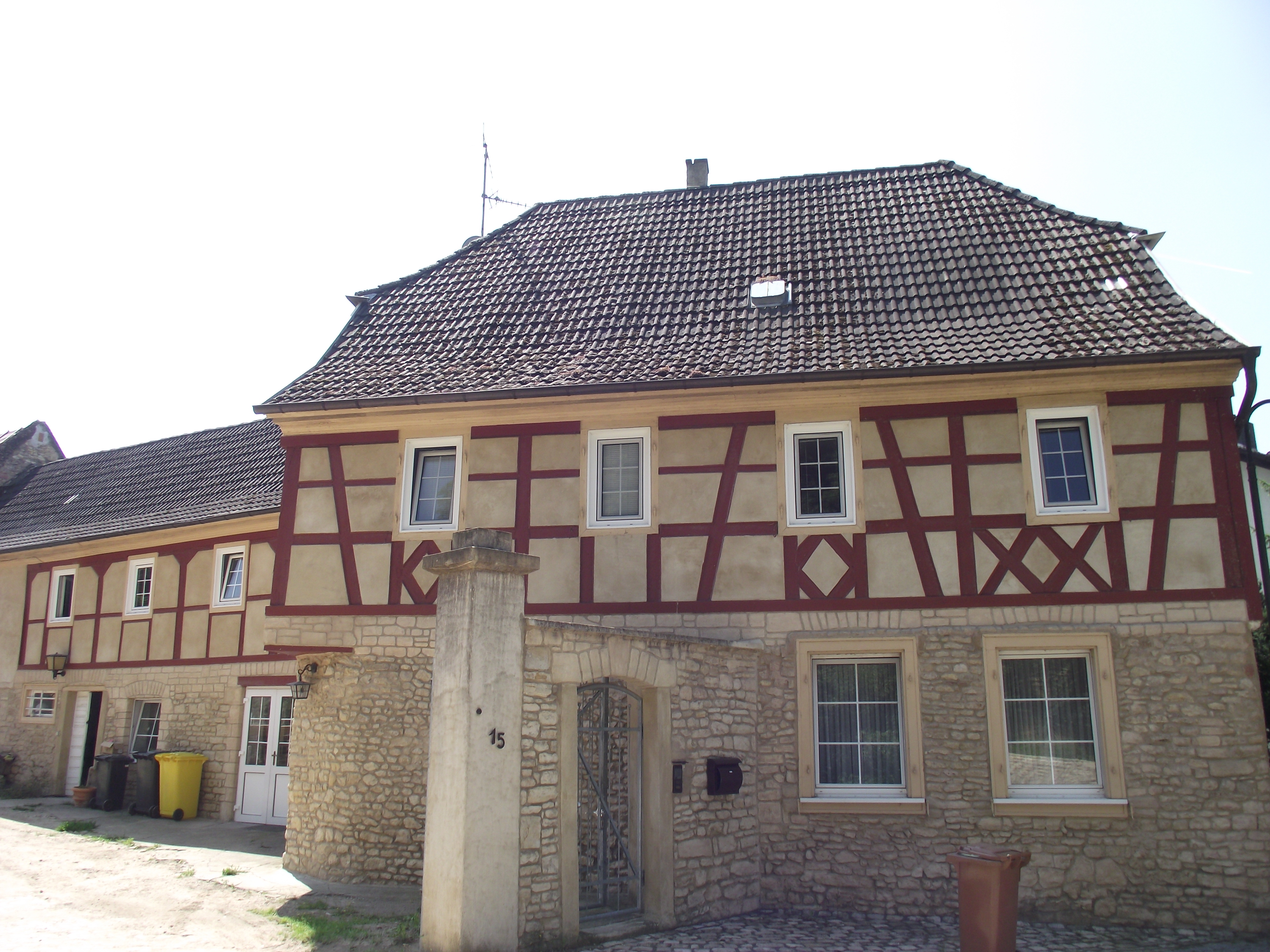 Renovierte Barockgebäude des Nonnenklosters Engeltal in Ober-Ingelheim